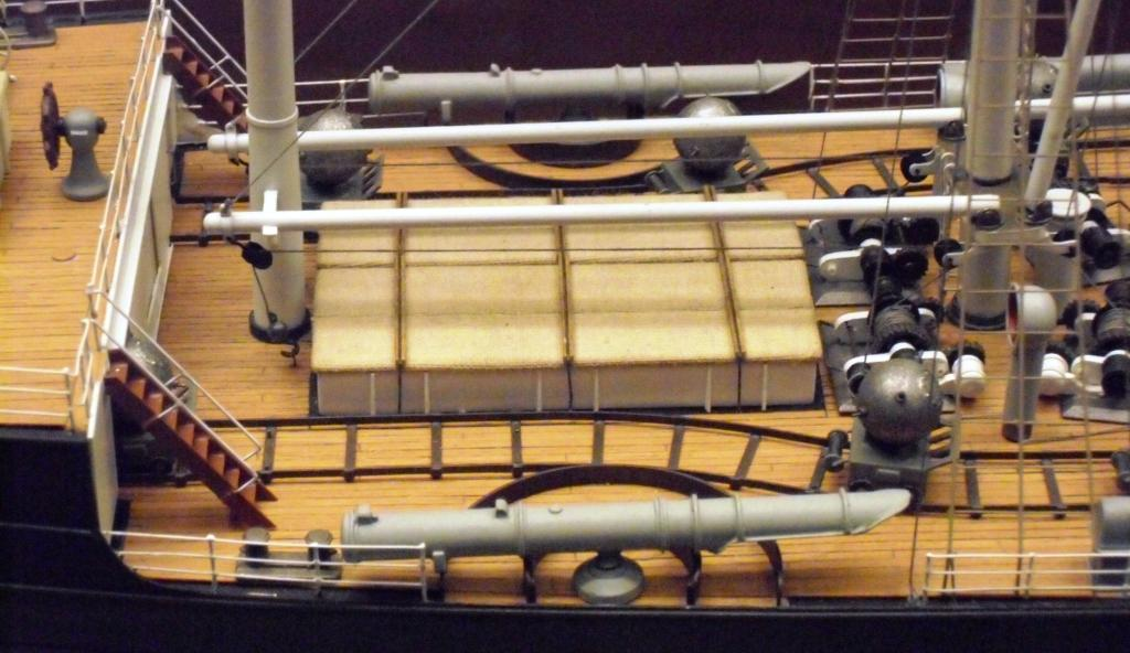 Modell Hilfskreuzer Möwe, Torpedorohre und Minen